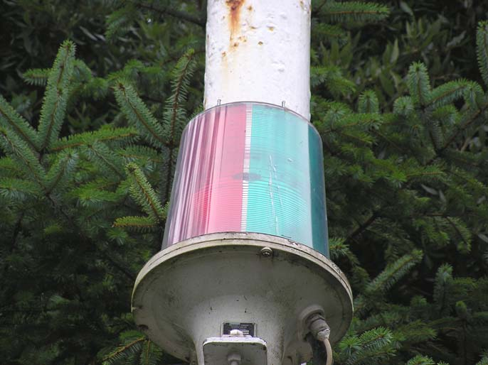 Feu directionnel d'atterissage de Sandhill Point à Salcombe Lieu : Salcombe, Grande Bretagne Date : 2005 Auteur : Photo personnelle